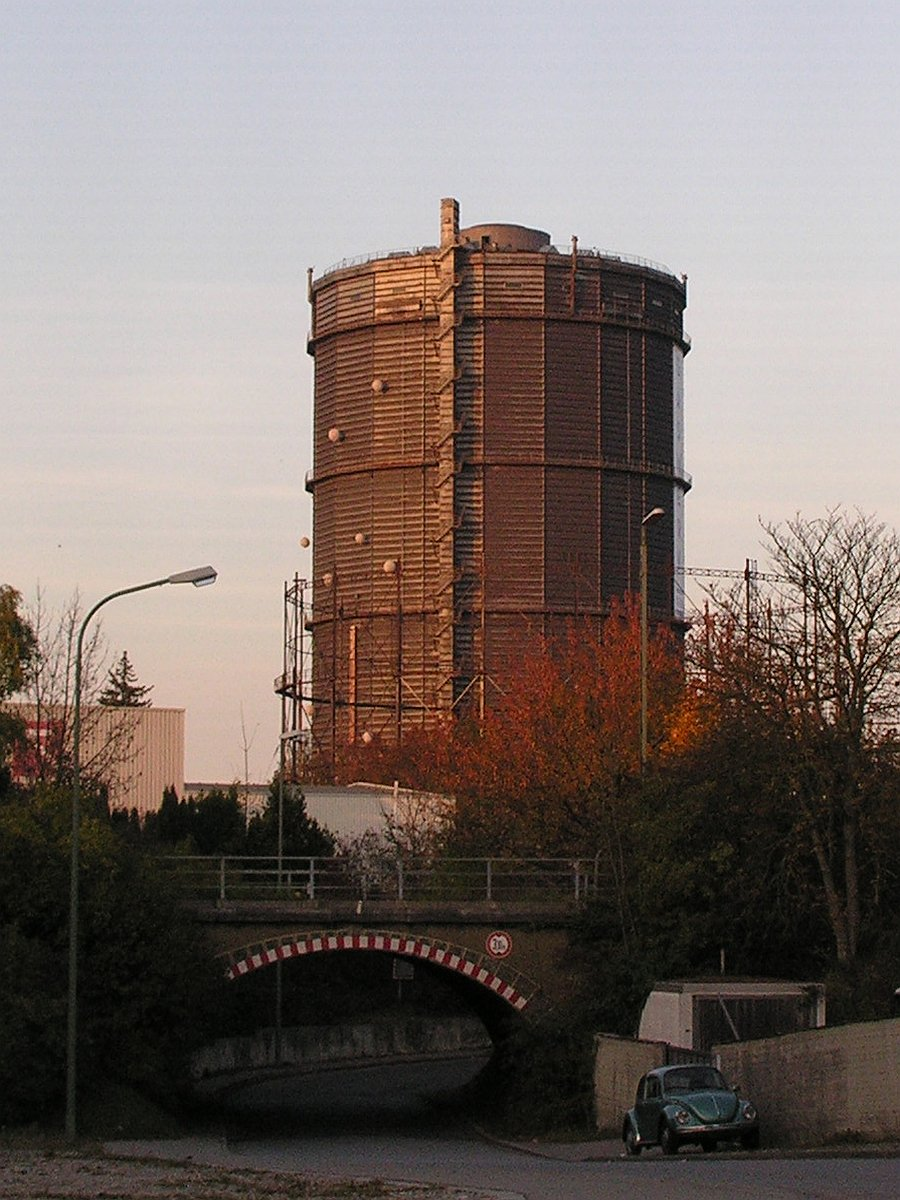 Augsburg-Oberhausen: der Gasbehälter in der Abenddämmerung